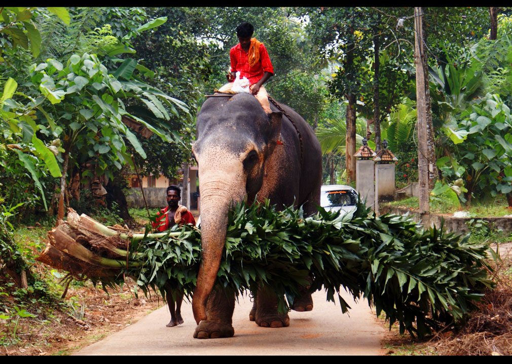 പനയോലയും കൊണ്ടു വരുന്ന ആന.